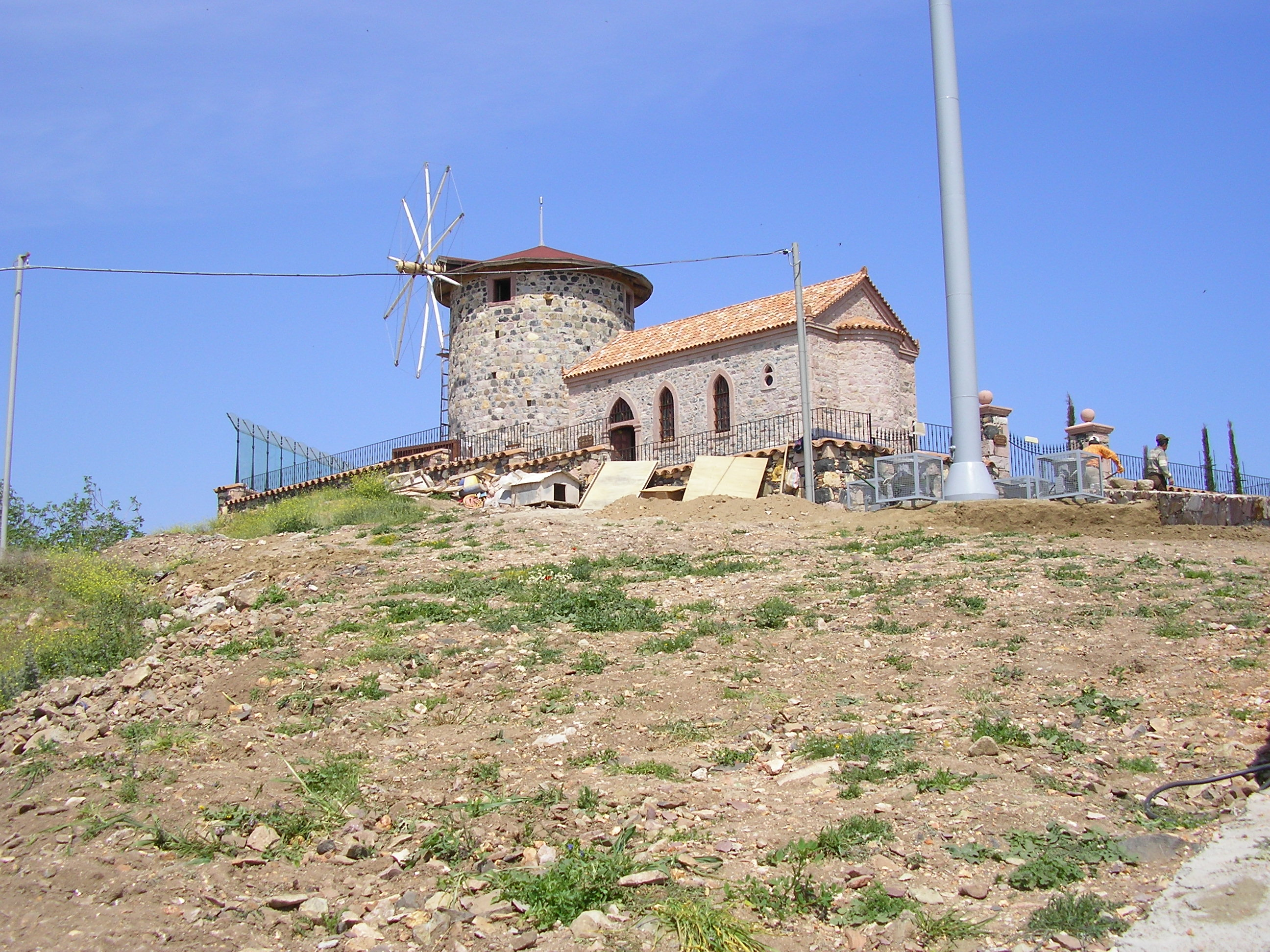 A mill in Ayvalık, Turkey